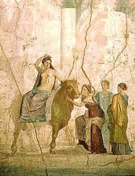 Da Pompeii, Casa di Giasone - Europa, rapita da Zeus sotto forma di toro, viene salutata dalle sue compagne che assistono alla sua partenza trionfale, mentre una delle amiche accarezza il toro.